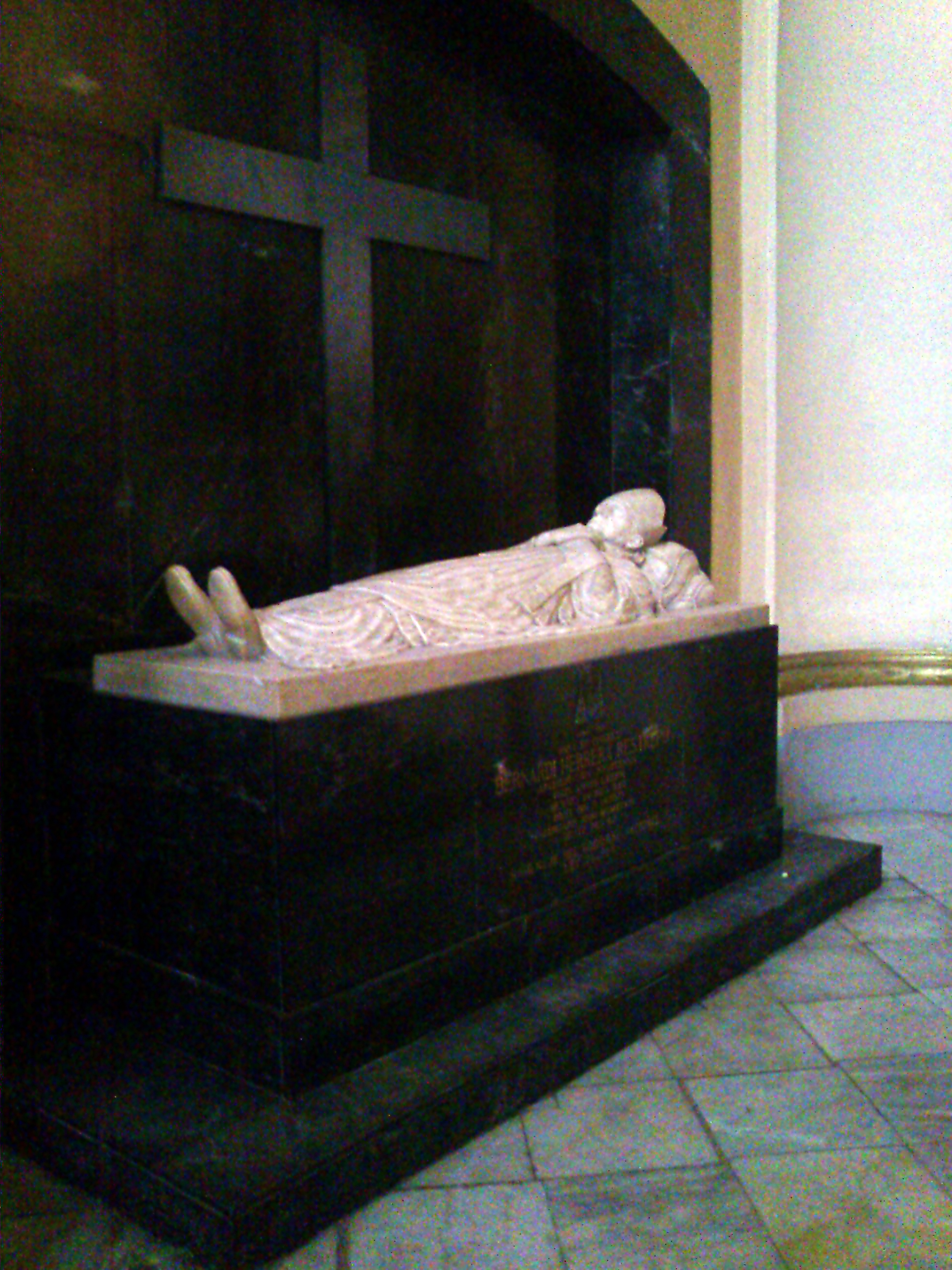 Sarcófago de Mons. Bernardo Herrera Restrepo en la Capilla de la Inmaculada Concepción - Catedral Primada de Colombia